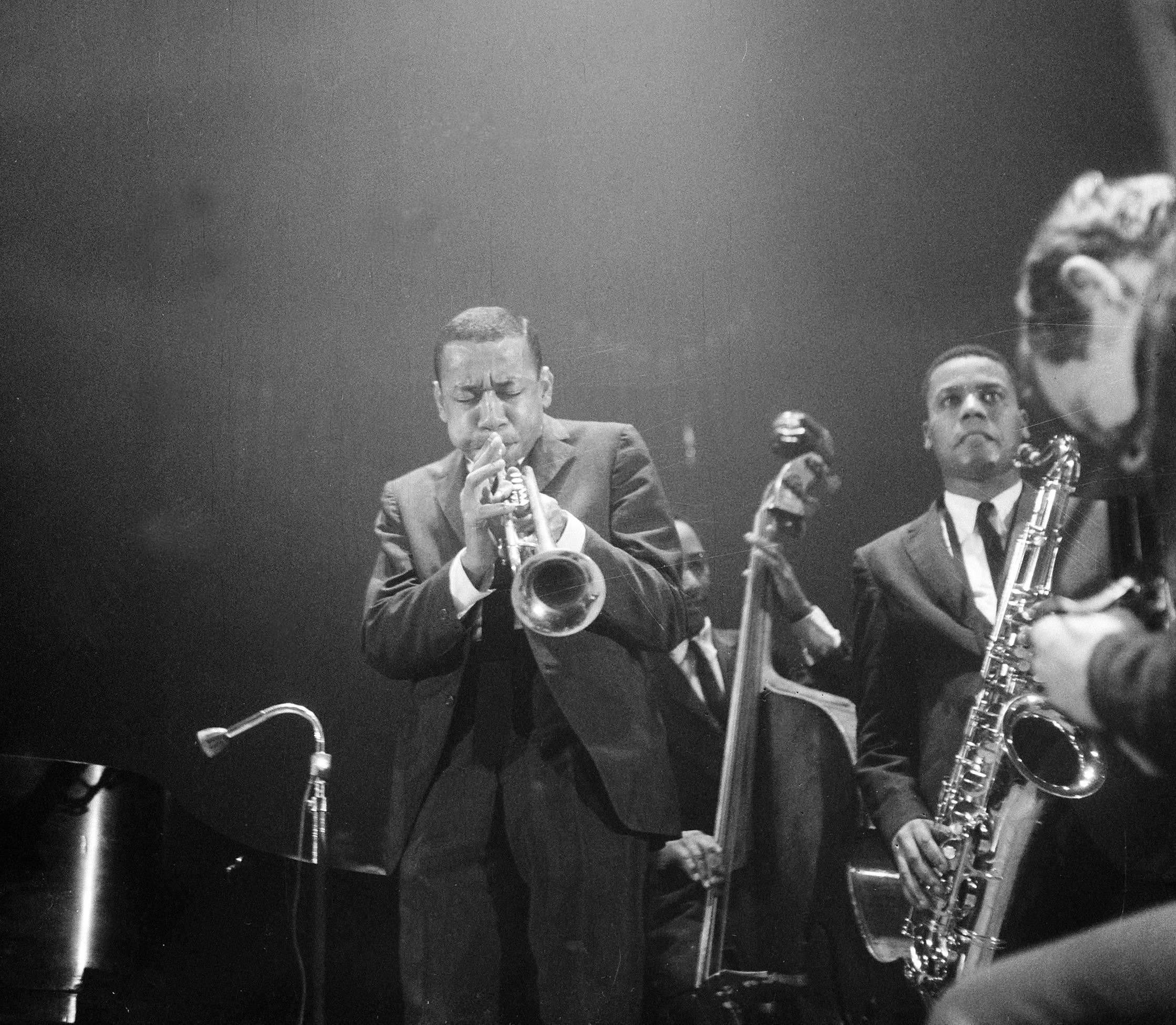 Collectie / Archief : Fotocollectie Anefo Reportage / Serie : [ onbekend ] Beschrijving : Concertgebouw Amsterdam, Art Blakey en Jazz Messengers Walter Davis Jr , Lee Morgan Datum : 15 november 1959 Locatie : Amsterdam, Noord-Holland Trefwoorden : CONCERTGEBOUWEN Persoonsnaam : Art Blakey, Doois, Walter, Joss Messengers, Morgan, Lee Fotograaf : Behrens, Herbert / Anefo Auteursrechthebbende : Nationaal Archief Materiaalsoort : Negatief (zwart/wit) Nummer archiefinventaris : bekijk toegang 2.24.01.03 Bestanddeelnummer : 910-8268 Reacties Geplaatst door Jazz liefhebber op 16 mei 2017 - 18:56. Art Blakey en zijn Jazz Messengers: Walter Davis, Wayne Shorter, Lee Morgan en Merritt V.l.n.r.: trompettist Lee Morgan, bassist Merritt en tenor-sax Wayne Shorter